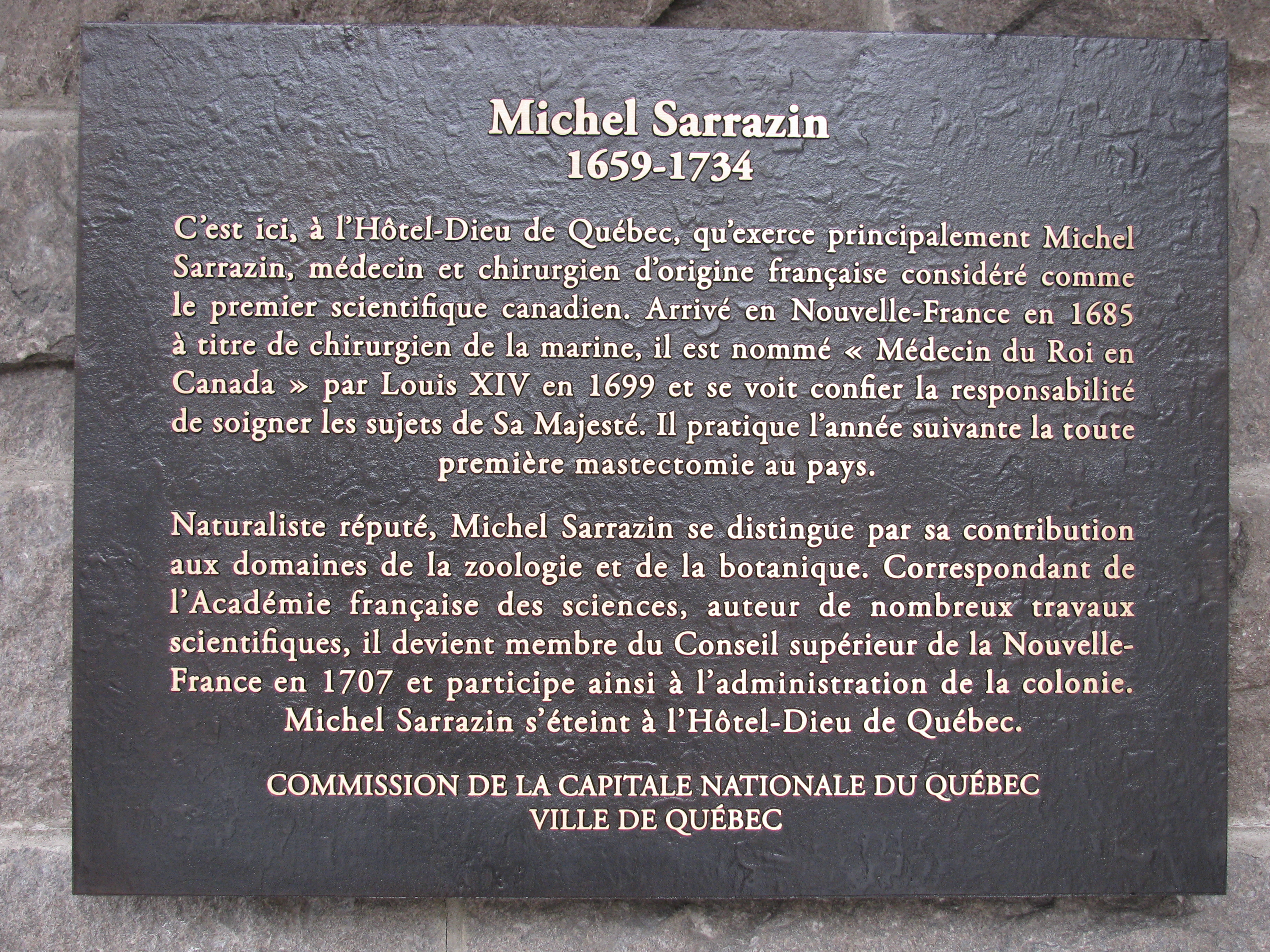 La plaque commémorative en hommage à Michel Sarrazin (1659-1734), médecin et chirurgien d'origine française considéré comme le premier scientifique canadien, est située à l'entrée de l'Hôtel-Dieu de Québec au 11, côte du Palais.